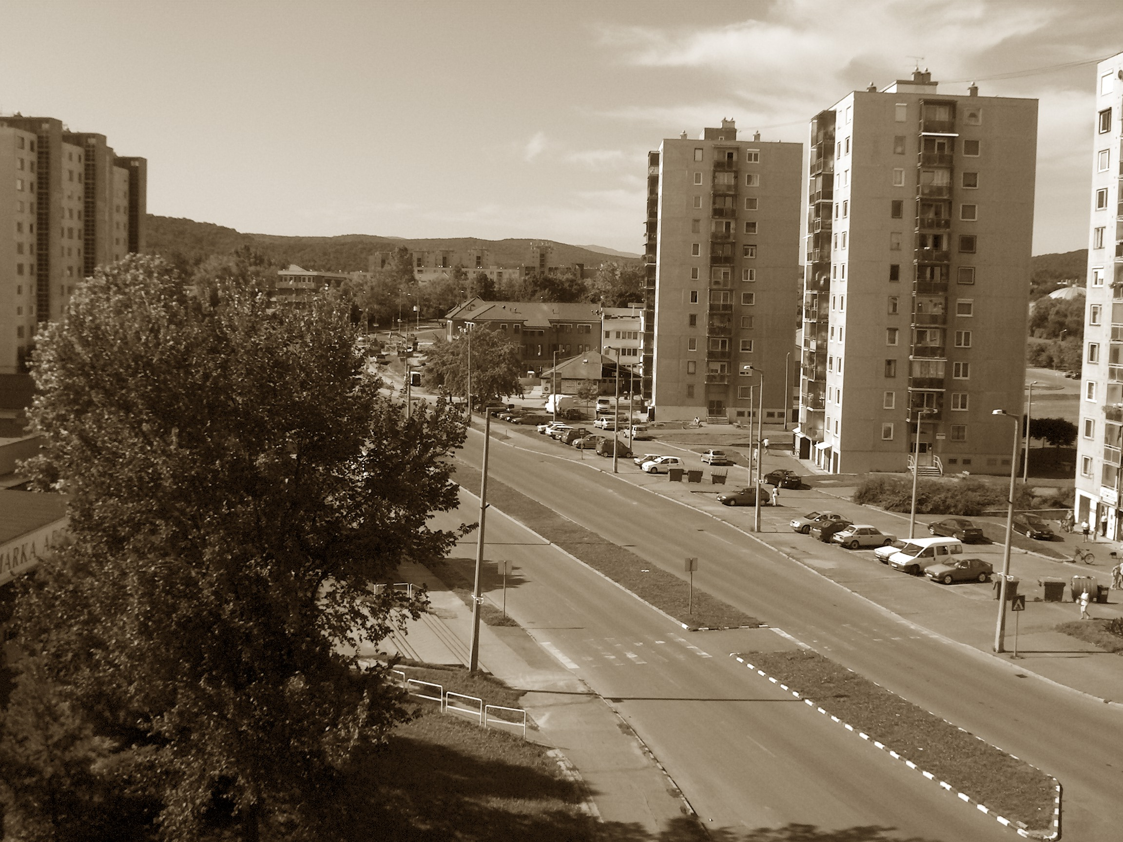 Kazincbarcika